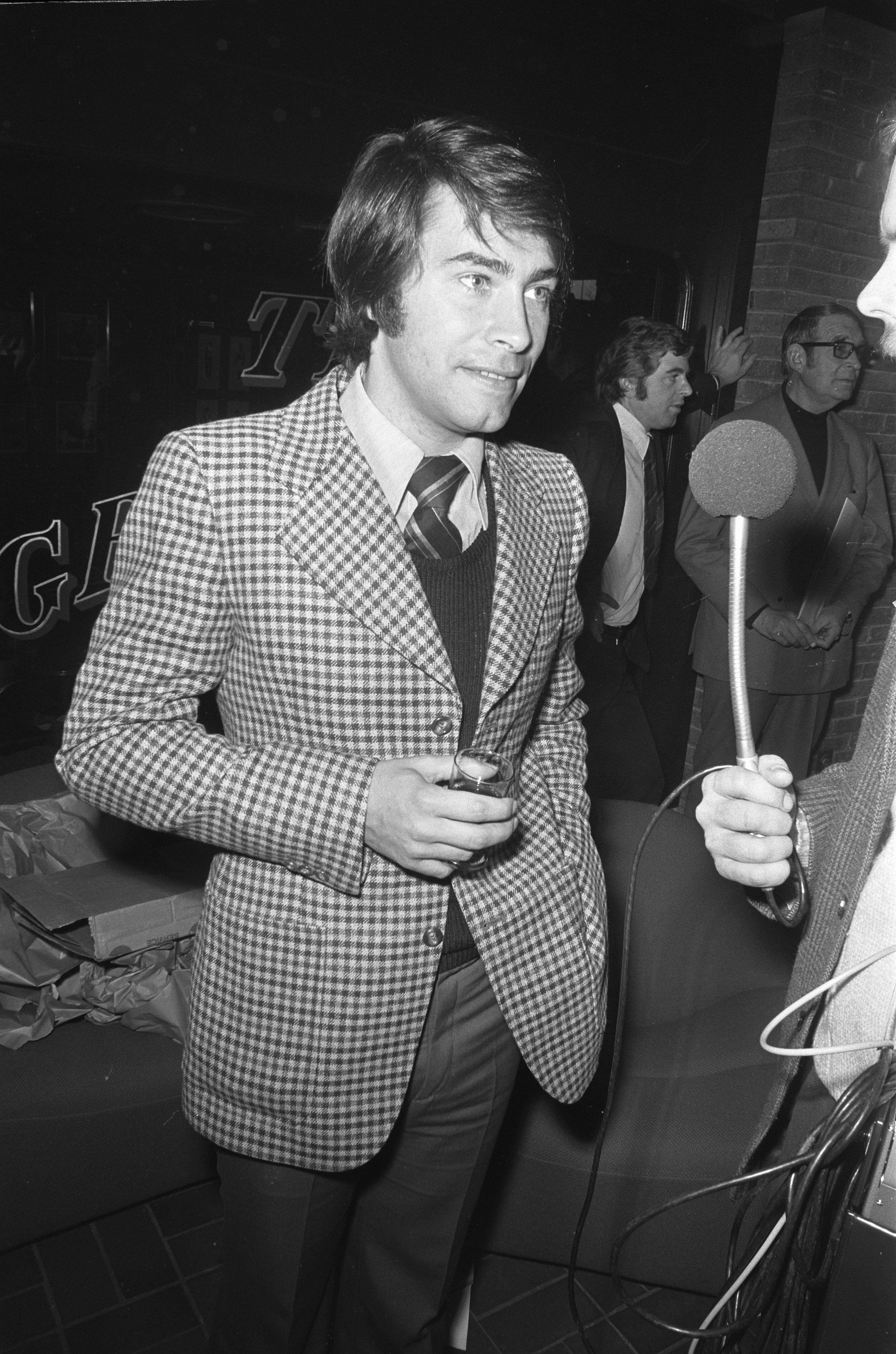 Roy Black bei einem Presseempfang in den Niederlanden